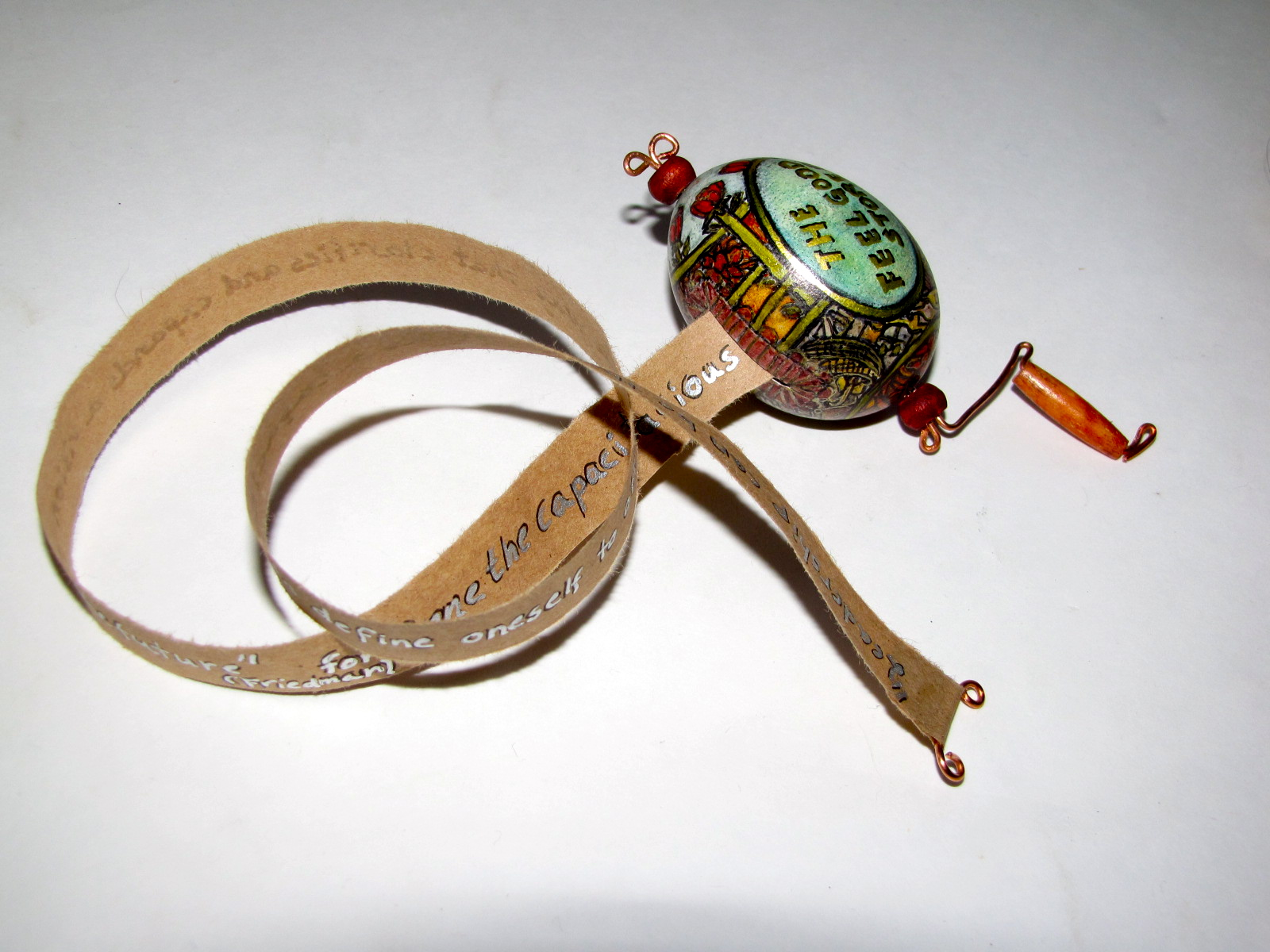 Modern Biedermeier Scroller